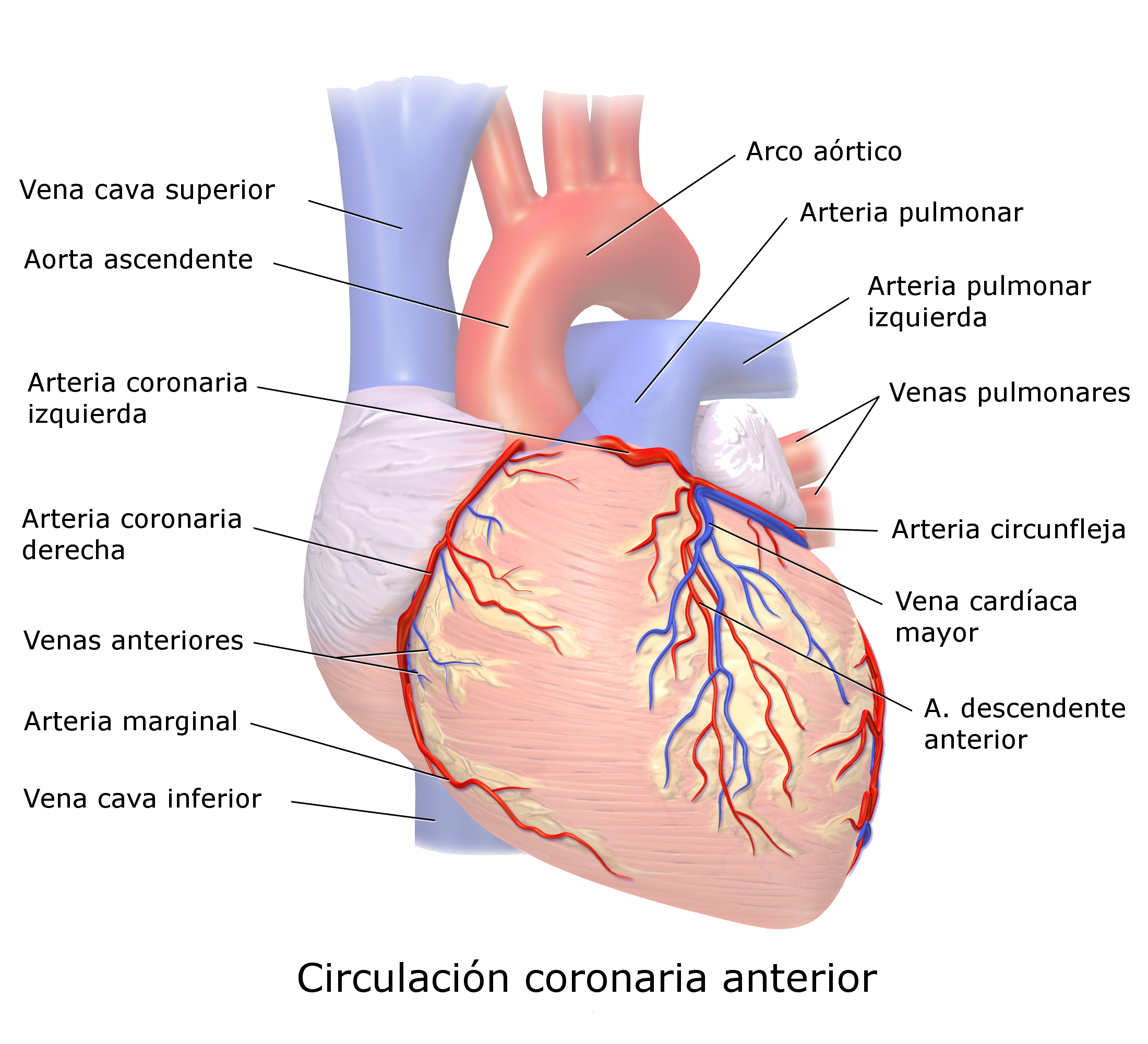 Imagen anterior del corazón humano en la que puede observarse la circulación coronaria anterior.